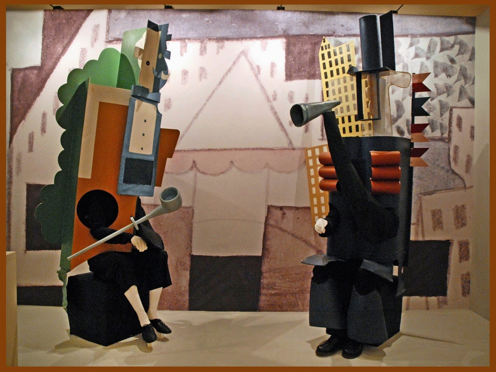 D'après Pablo Picasso Costume pour le Manager français (gauche) Costume pour le Manager américain (droite) Parade (1917) Répertoire de la compagnie des Ballets russes dirigée par Serge Diaghilev Argument : Jean Cocteau Musique : Eric Satie Décors et costumes : Pablo Picasso Chorégraphie originale : Léonide Massine Exposition Ballets russes Bibliothèque-musée de l'Opéra de Paris